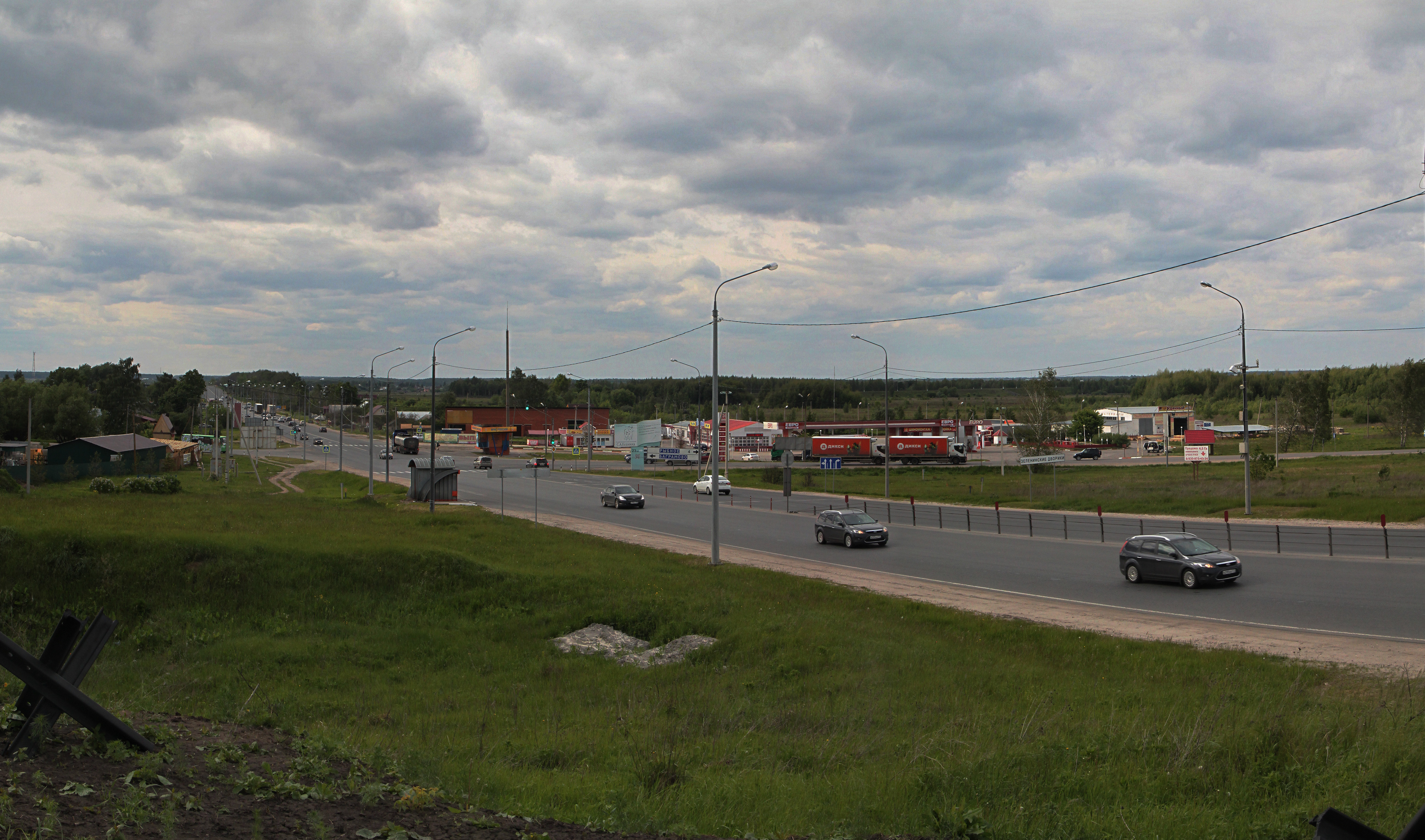 Трасса М5 у с.Зеленинские Дворики Рыбновского района Рязанской области. Перекресток с дорогой Баграмово - Рыбное - Константиново